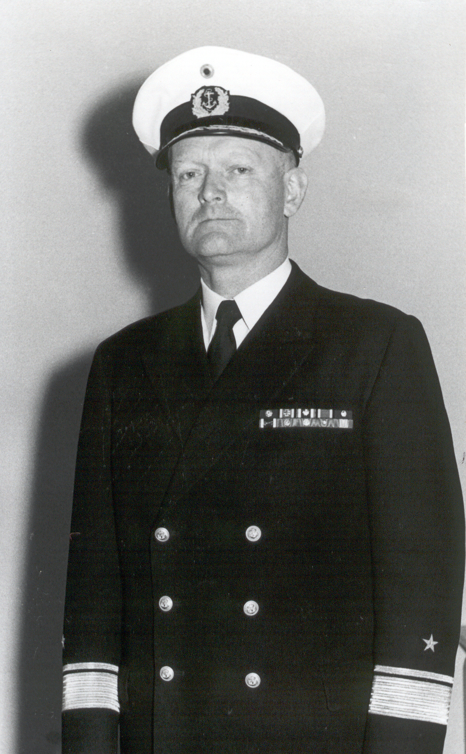 Porträtfotografie von Flottillenadmiral Hubert Freiherr von Wangenheim